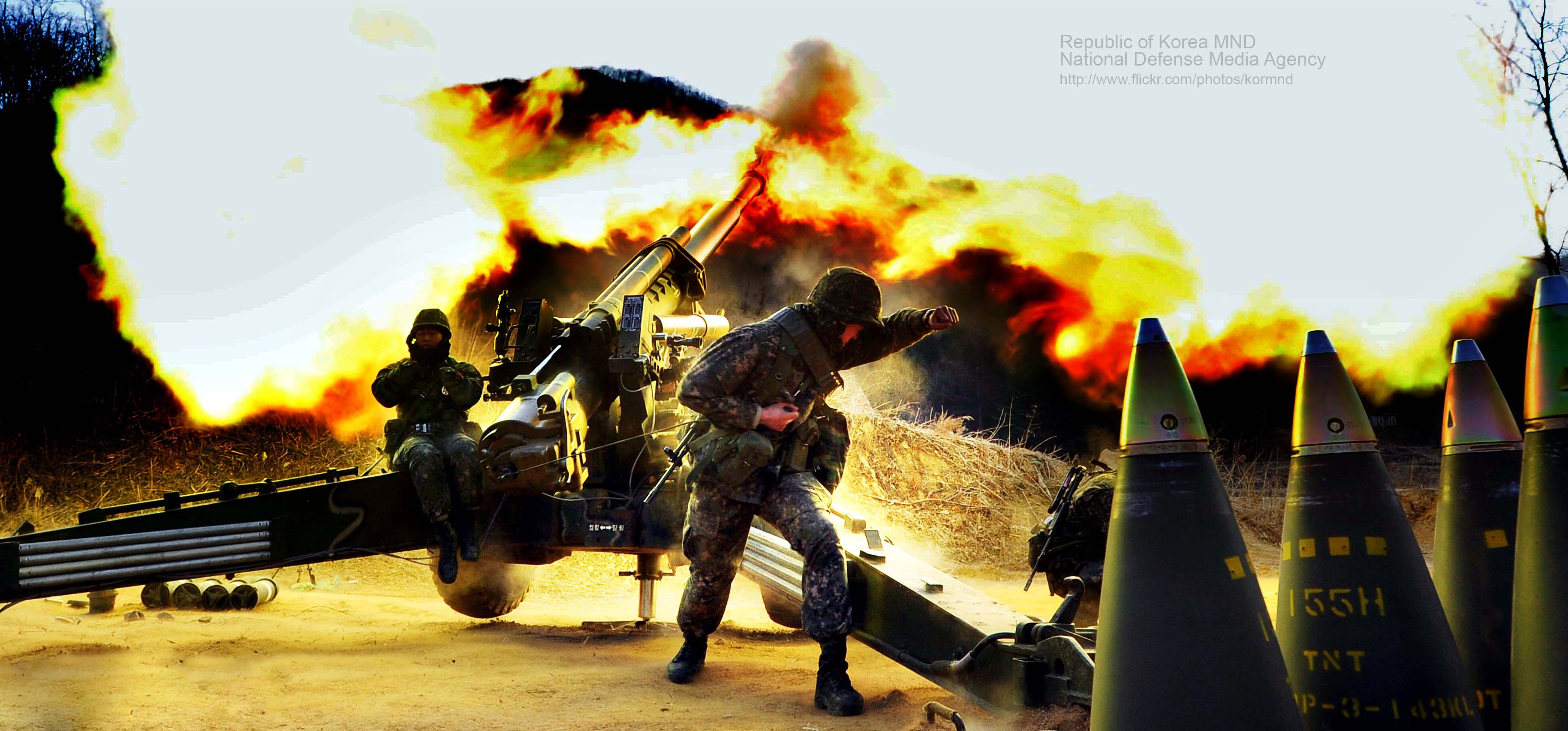 지난 12일 강원도 철원군 말고개 포병훈련장에서 열린 육군 27사단 웅비포병대대 포대전술훈련 중 장병들이 KH-179 155mm 견인포 사격을 하고 있다. 촬영 - 이헌구 기자